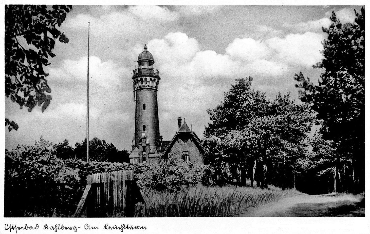 Wygląd z ok. 1930